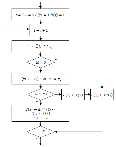 Схема алгоритма Берлекэмпа — Мэсси в общем виде.